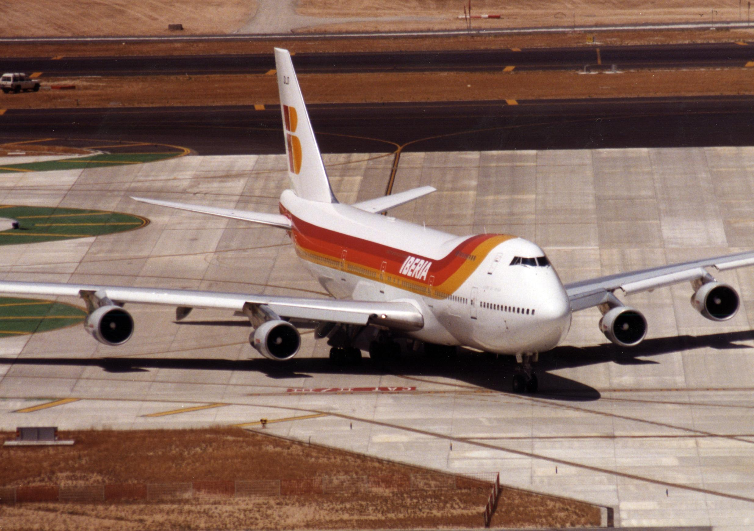 EC-DLD (cn 22455/515)